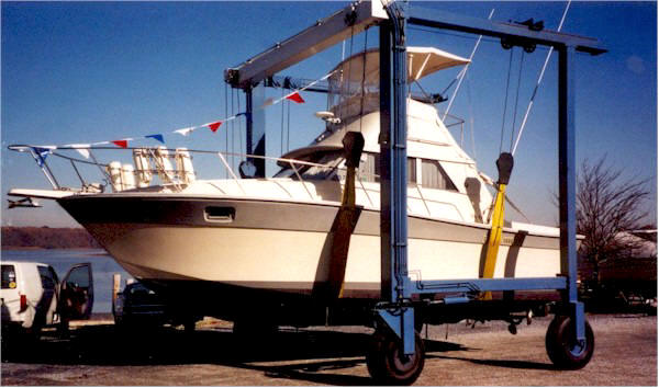 Droogzetinstallatie voor schepen